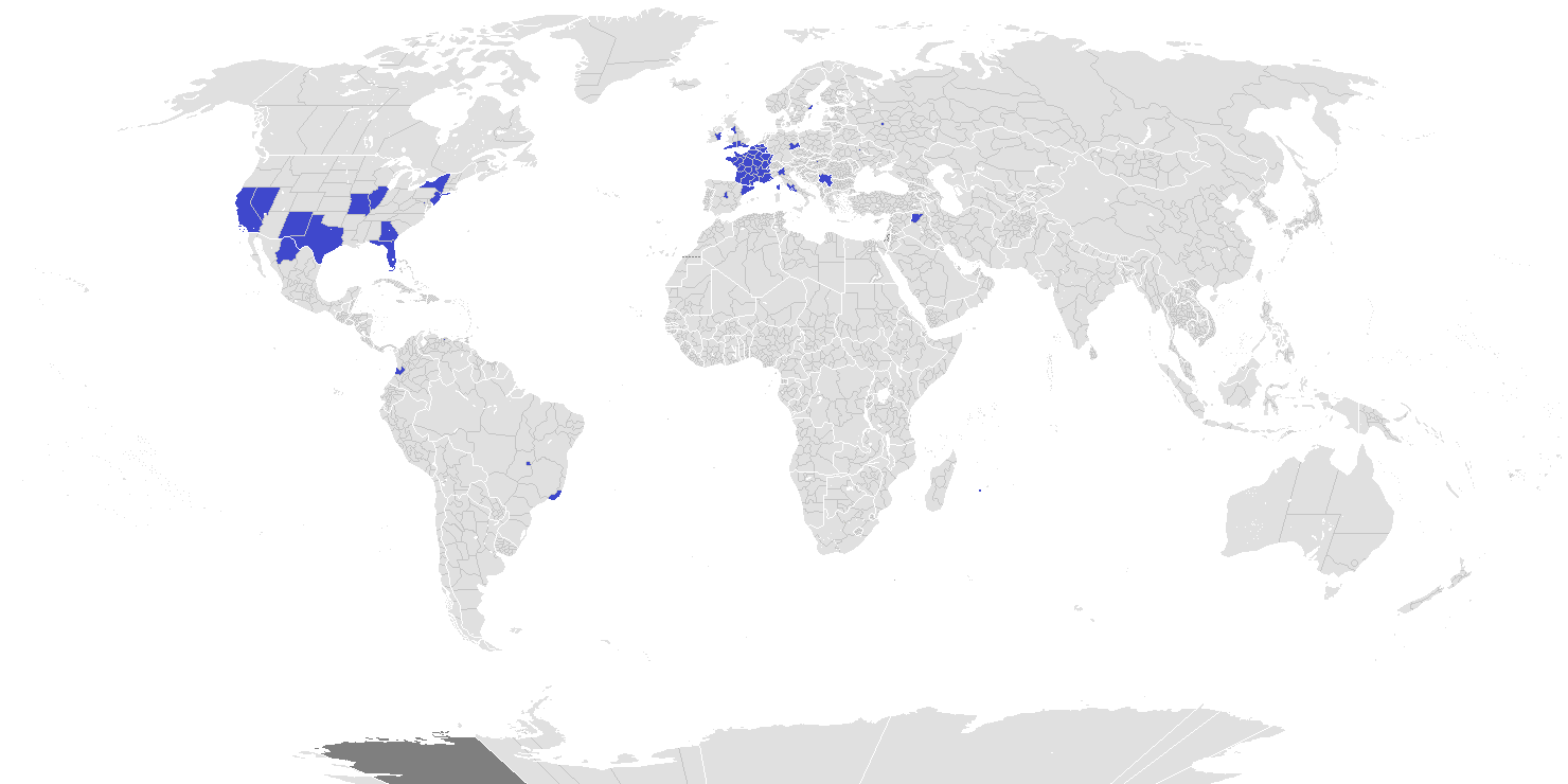 Cette carte montre les territoires régionaux visités au moins une fois par les journalistes de l'émission Quotidien de Yann Barthès, au cours de la saison 3 (2018-2019).